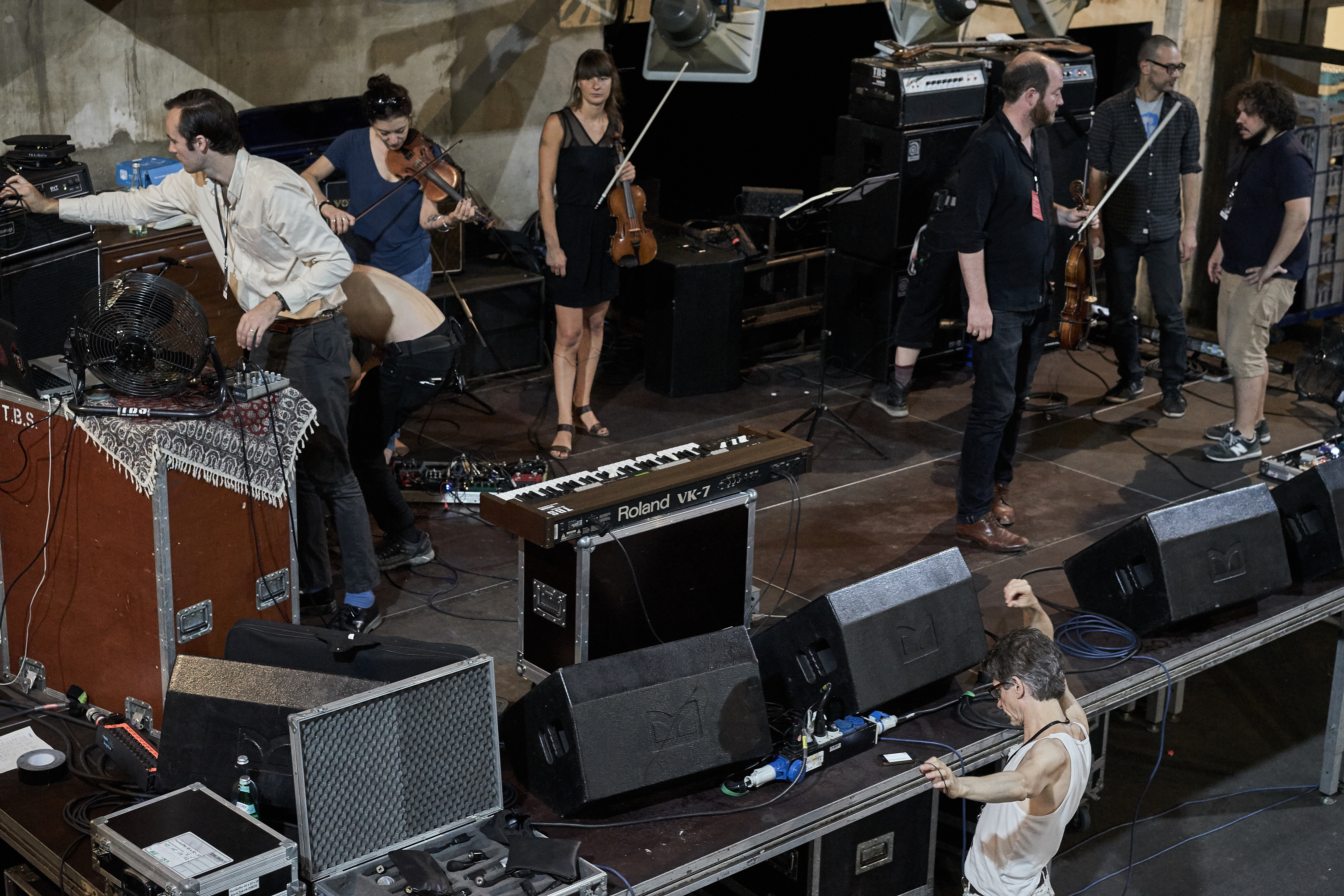 Alarme-Festival Konzert 2016 Berghain, Berlin